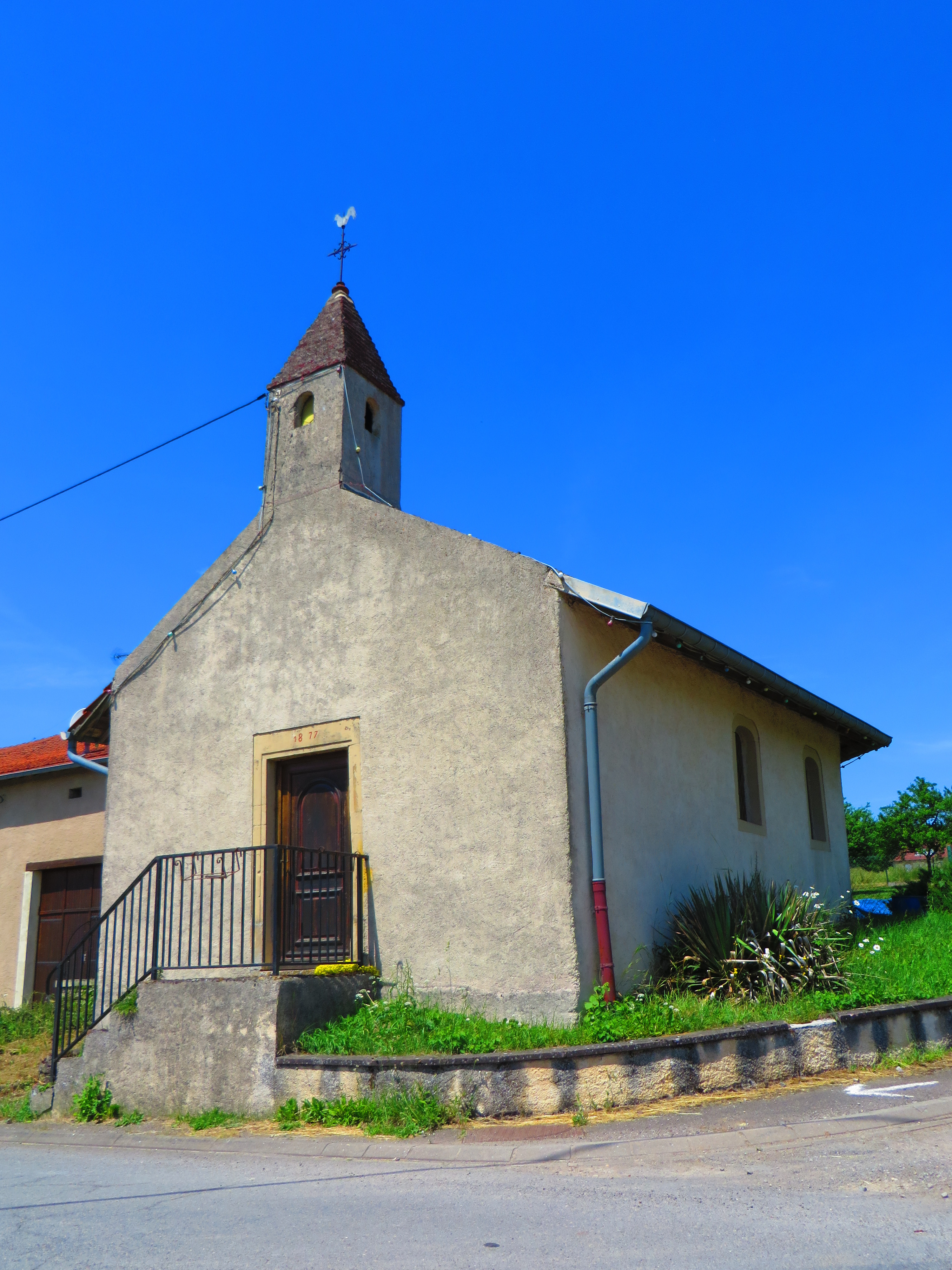 Laumesfeld Hargarten chapelle